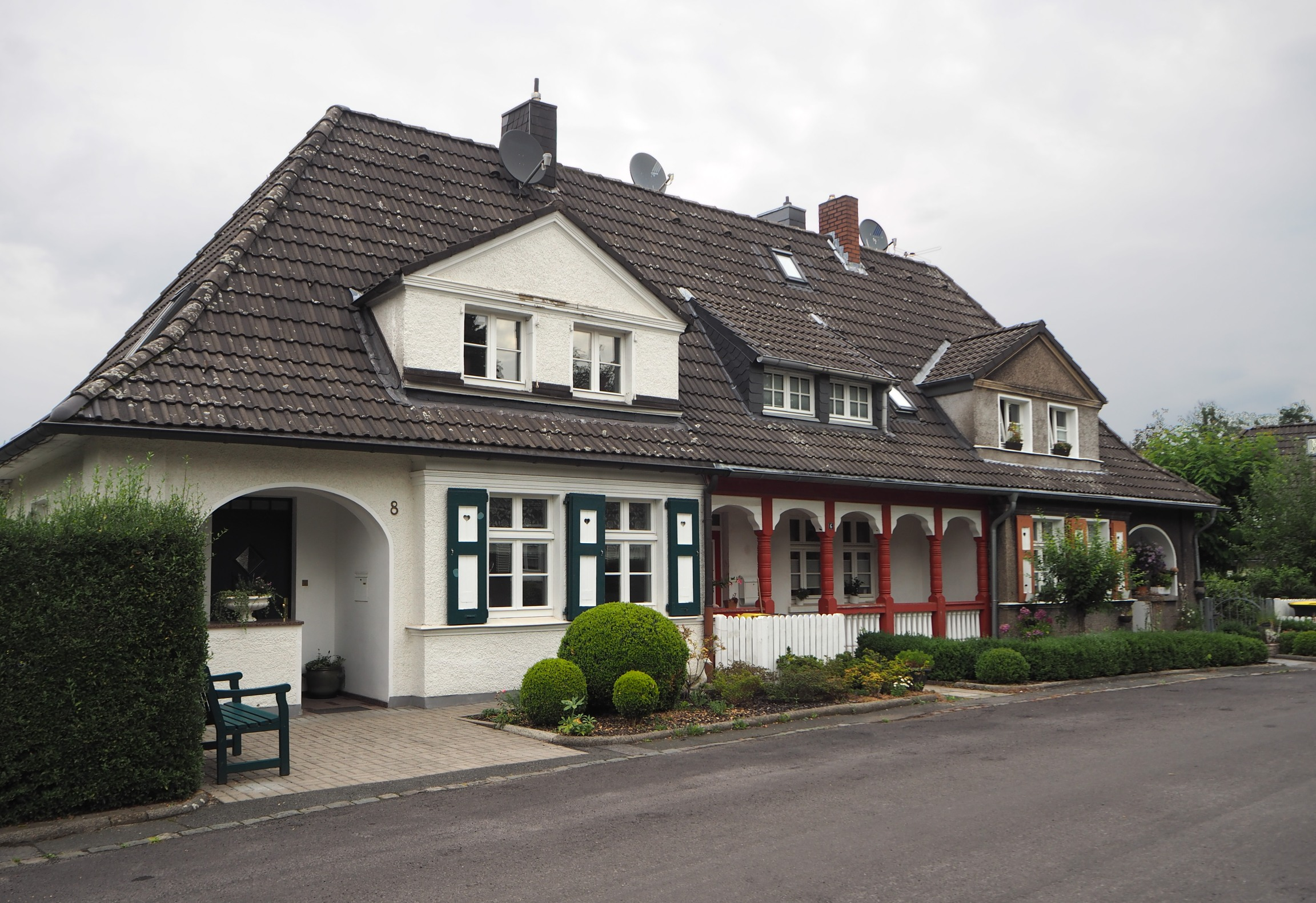 Essen, Krupp-Siedlung Altenhof 2, Hausbeispiel